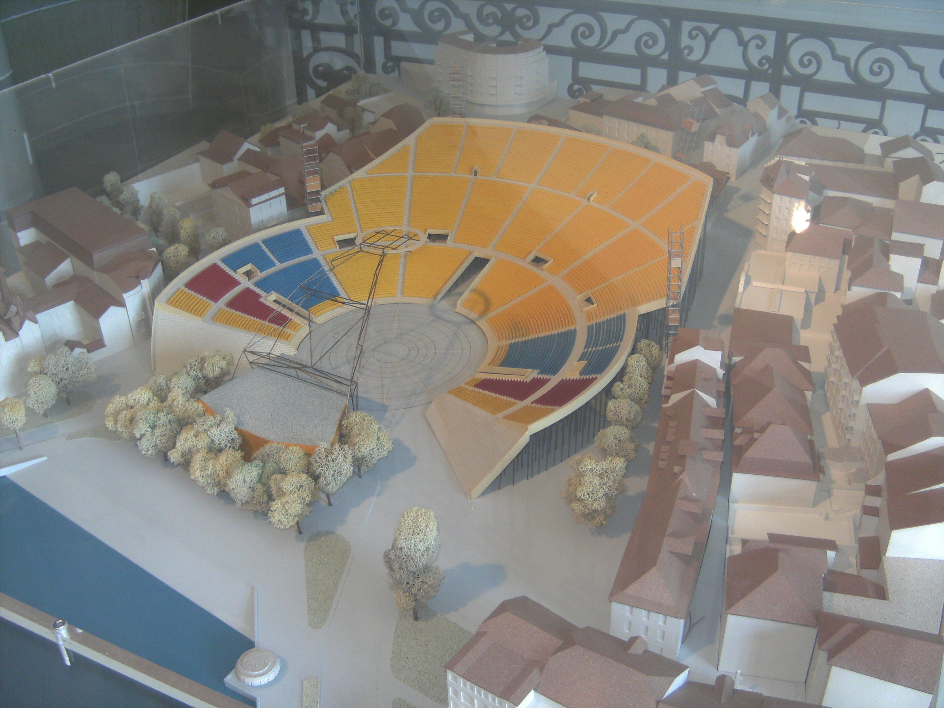 Vevey - fête des Vignerons - maquette de l'amphithéâtre de 1977 - exposée au musée historique de Vevey